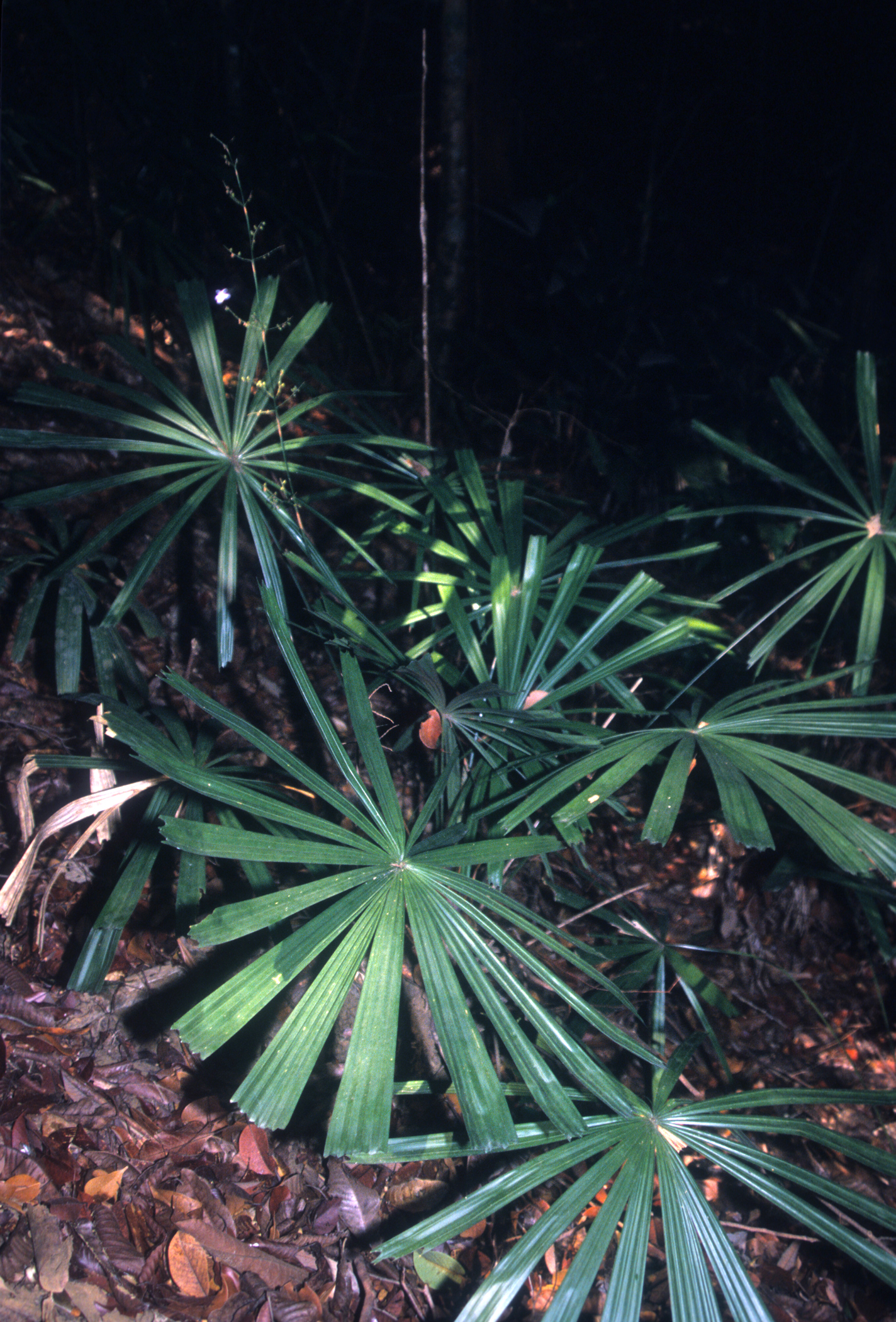 Bukit Bauk, Terengganu, Malaysia. Oct. 2002. from slide.